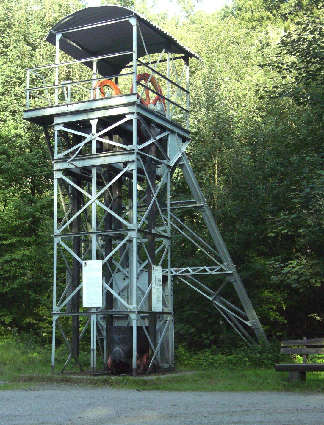 Schacht Franziska; Förderturm als Denkmal restauriert